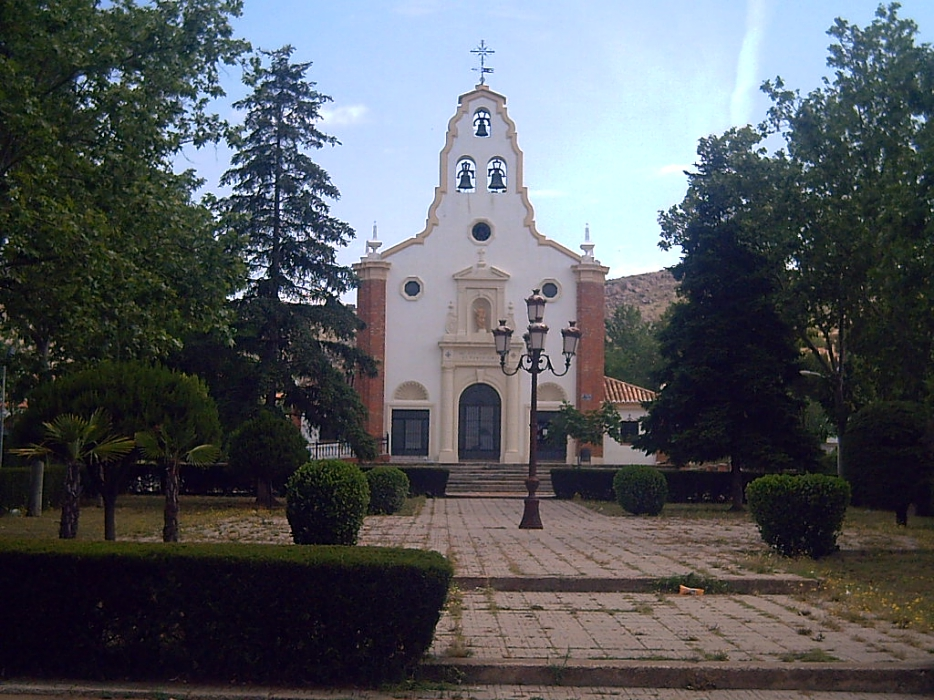 Puertollano, Santa Barbara Church